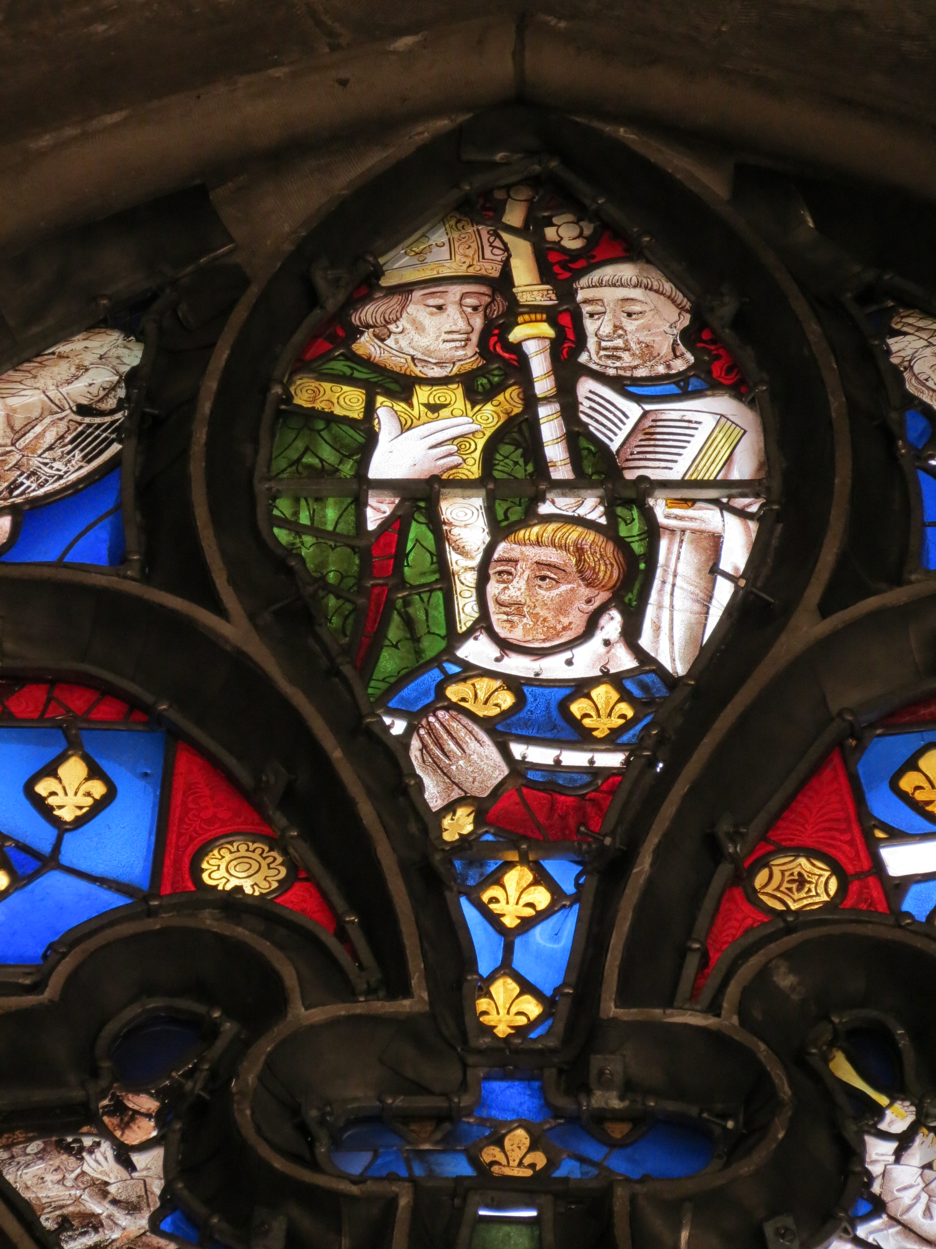 Louis XI reçoit l'onction de l'archevêque de Reims Jean Jouvenel des Ursins avec derrière lui un clerc tenant un livre ouvert.